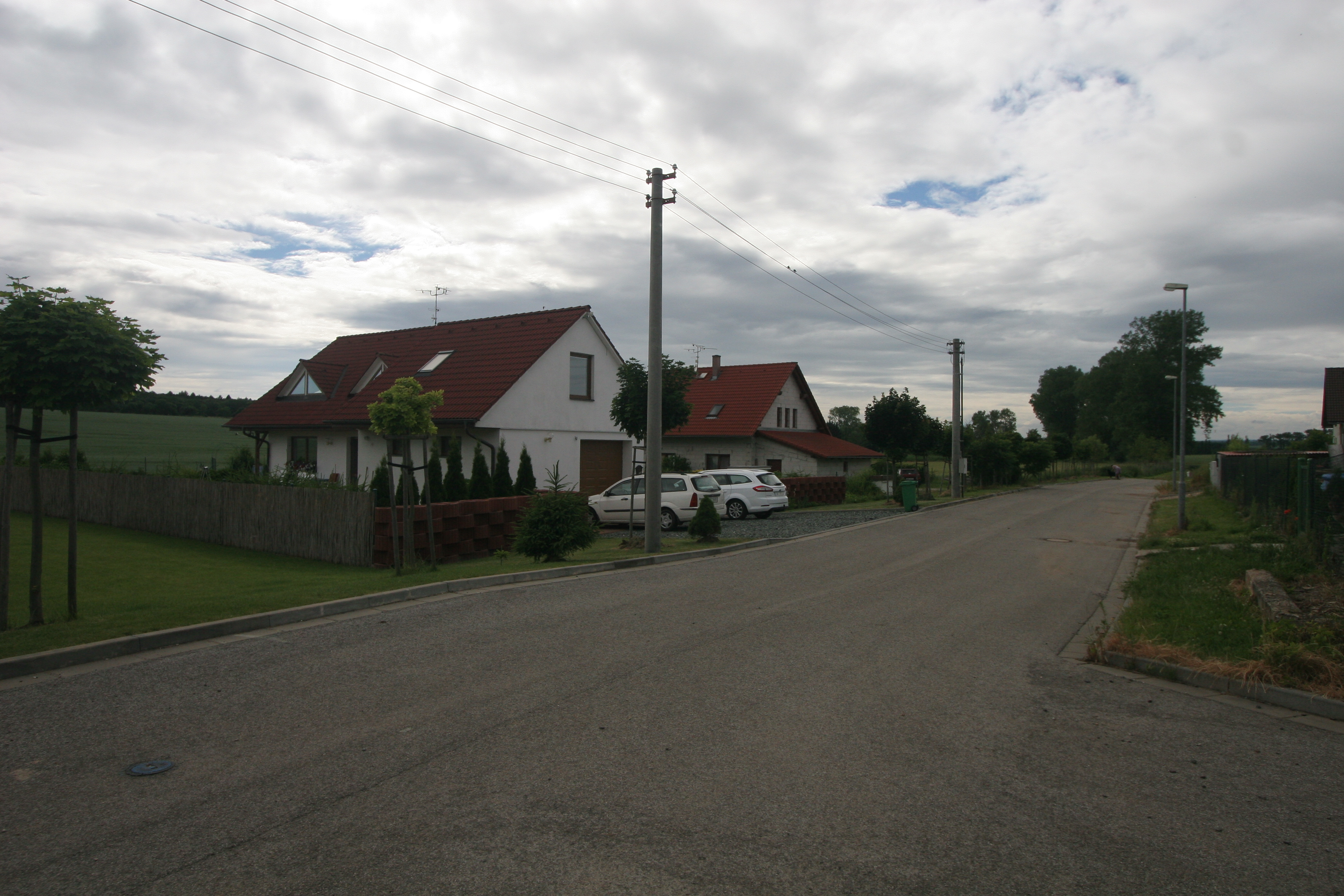 Čistěves čp. 52